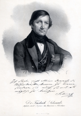 Portrait of Friedrich Schmalz